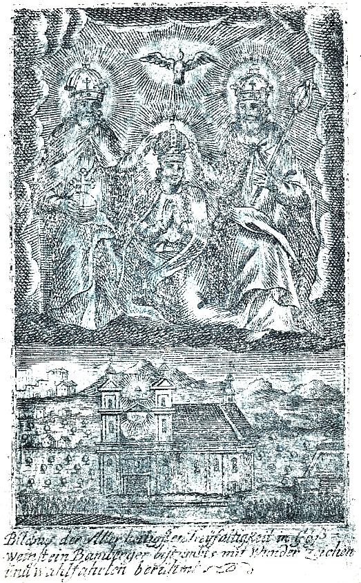 Wallfahrt Gößweinstein, Pilgerandenken um 1730